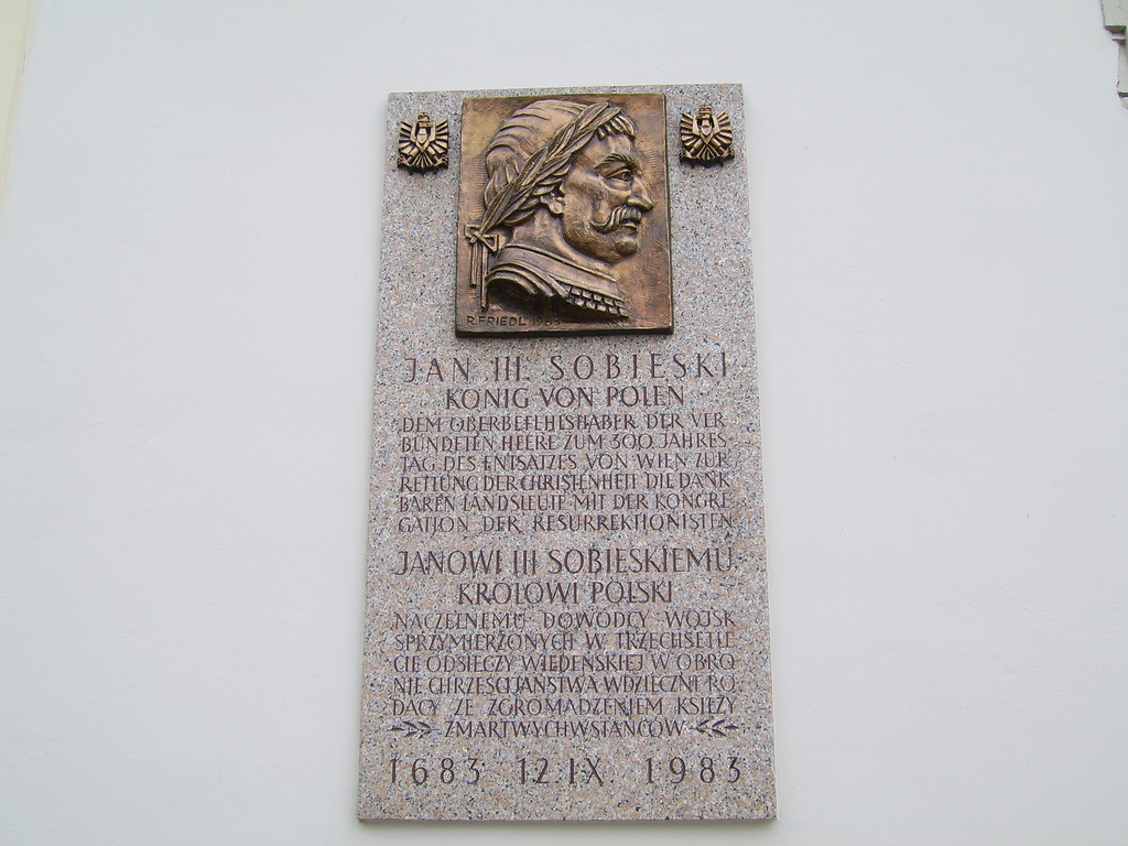 Tafel an der Josefskirche